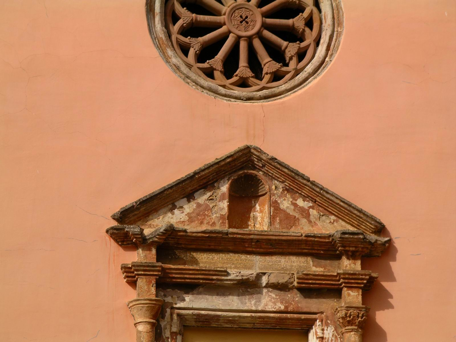 La chiesa delle Grazie, il rosone